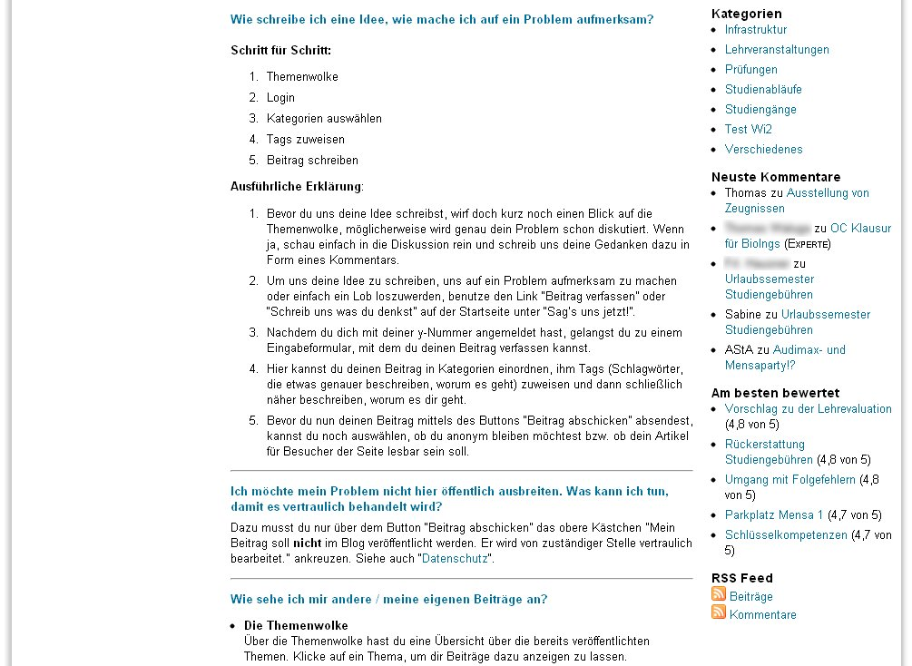 Bildschirmfoto des Ideenblogs Sag's uns